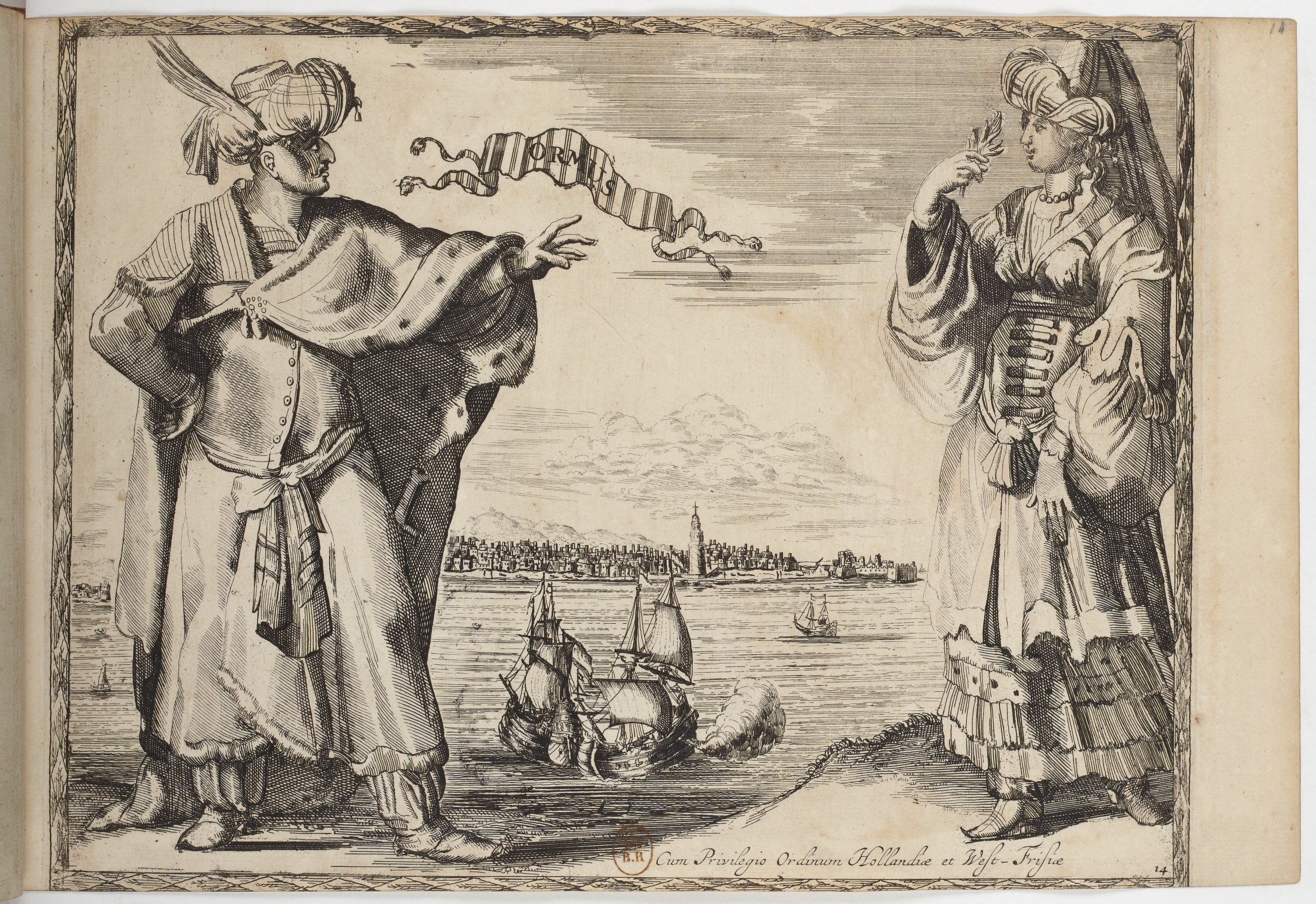 Costumes des quatre parties du monde, gravés dans la manière de Luycken (1670)